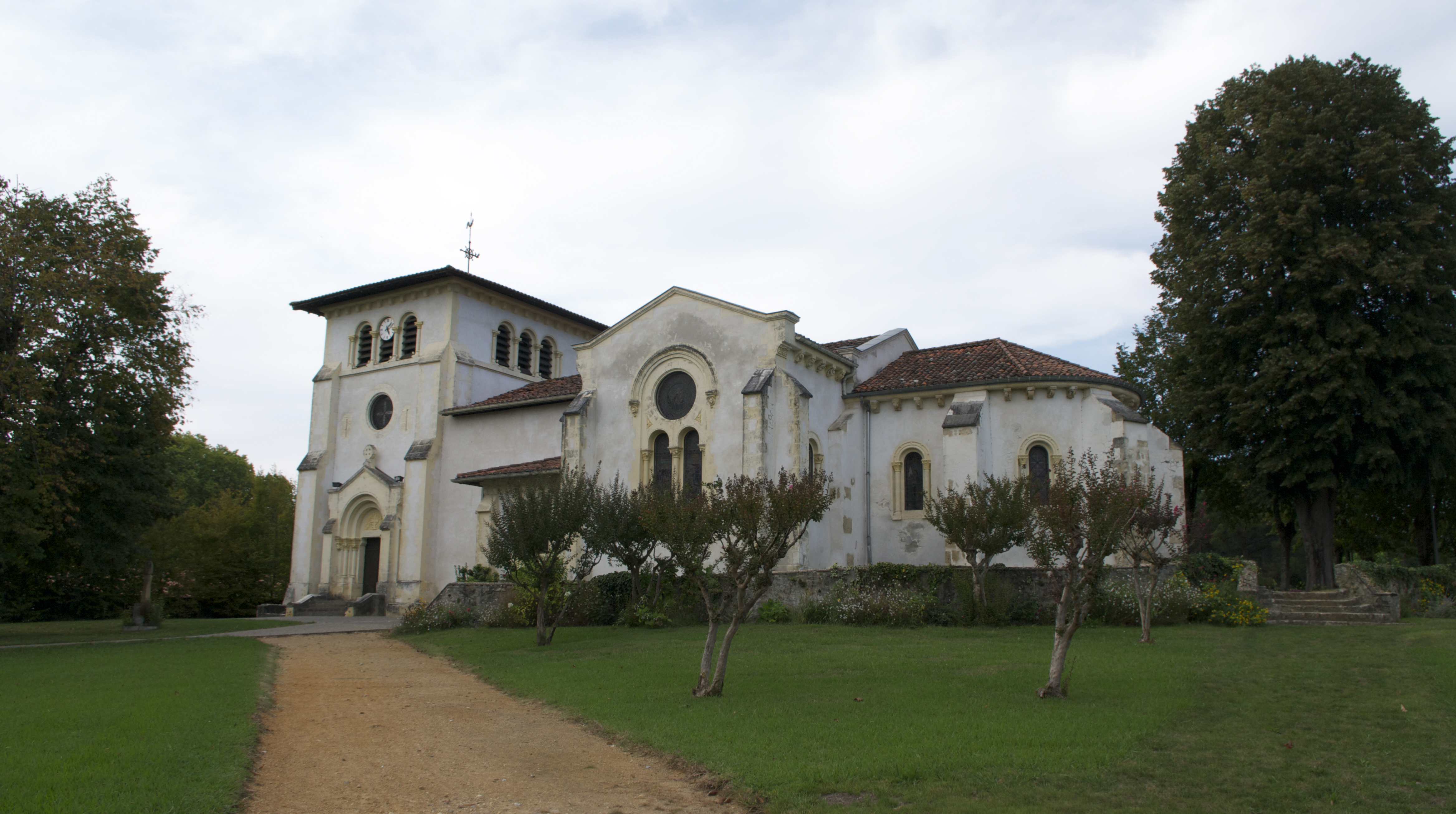 L'Église Saint-Sever de Tosse est situé sur la commune de Tosse, dans le département français des Landes. .